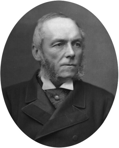 George Osborne Morgan